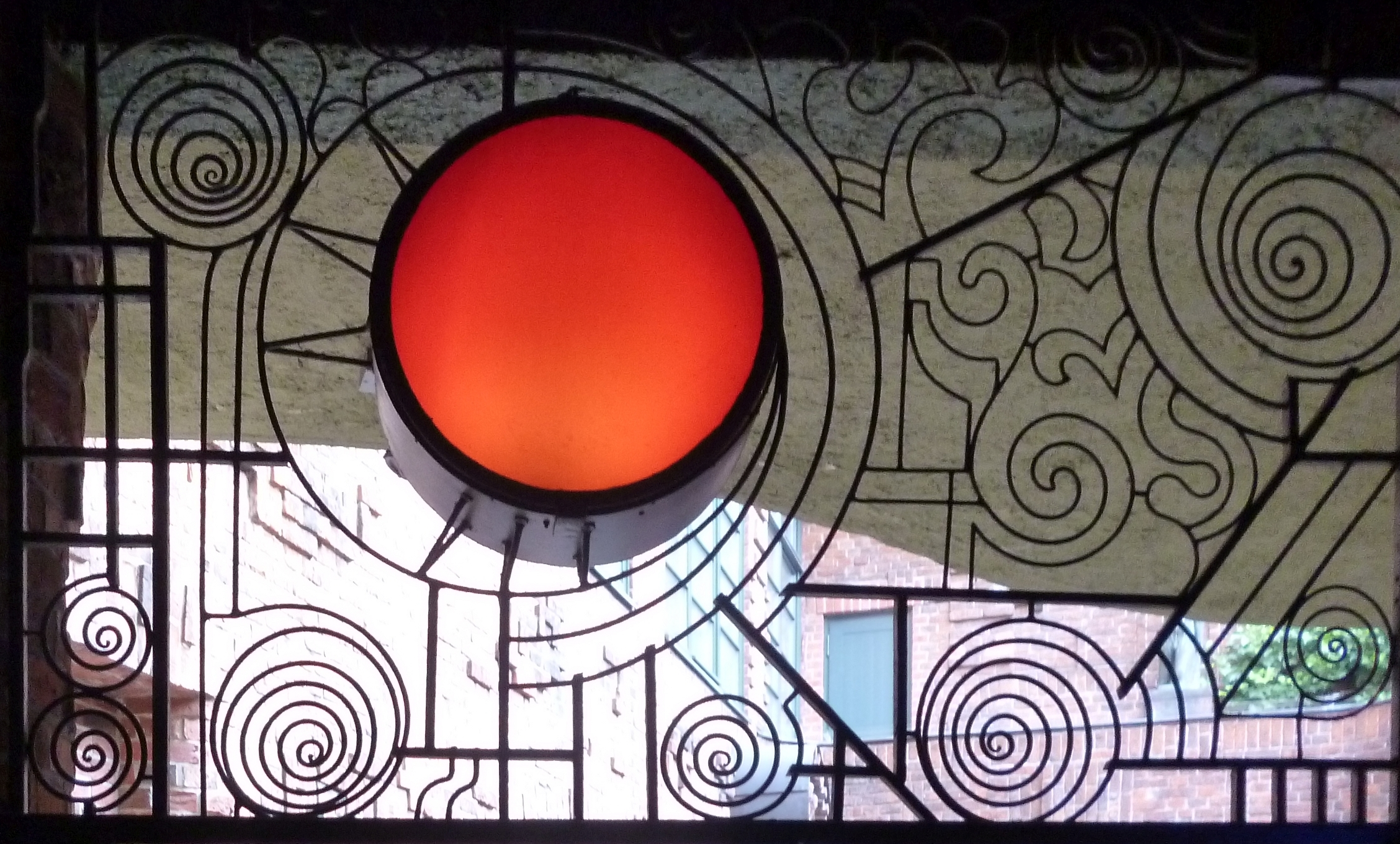 Ziergitter oberhalb des Durchgangs vom Paula Modersohn-Becker Museum zum Handwerkerhof in der Böttcherstraße in Bremen, Deutschland.